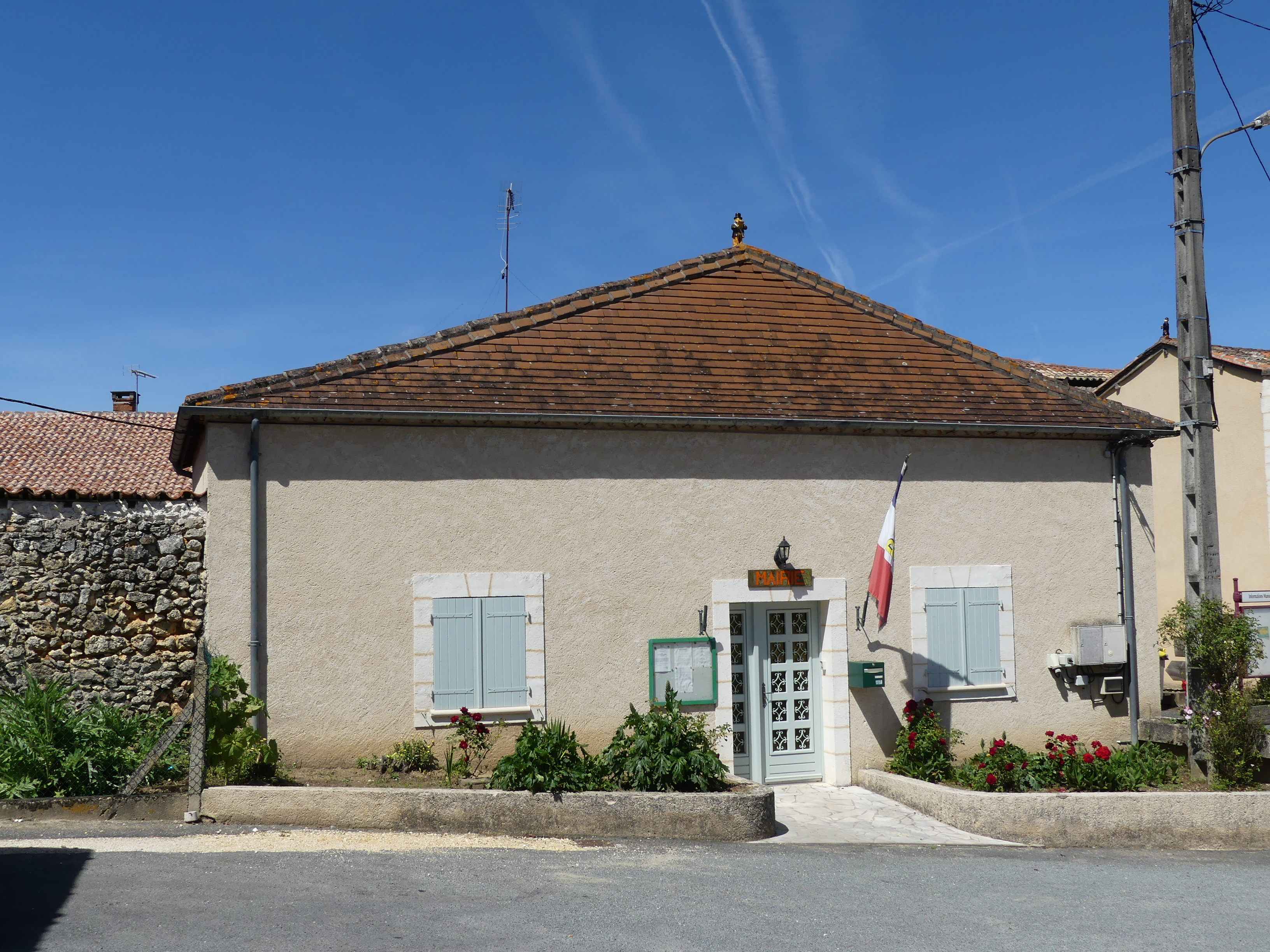 La mairie de Beauronne, Dordogne, France.